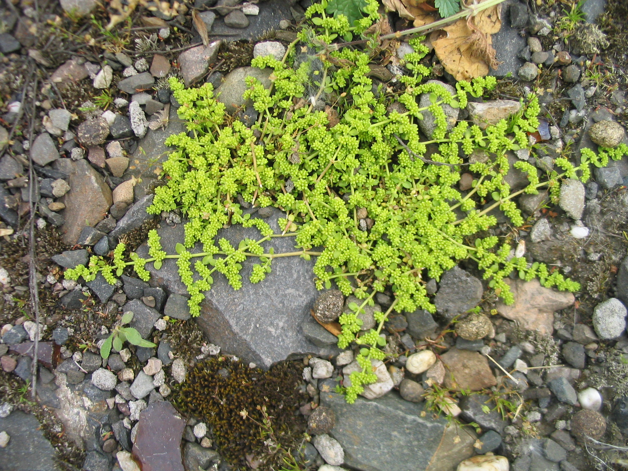 Hernaria glabra, Kahles Bruchkraut, fotografiert am 05.06.2005 in Bingen/Rhein, auf Ruderalfläche, Fotografiert von Dr. Hagen Graebner